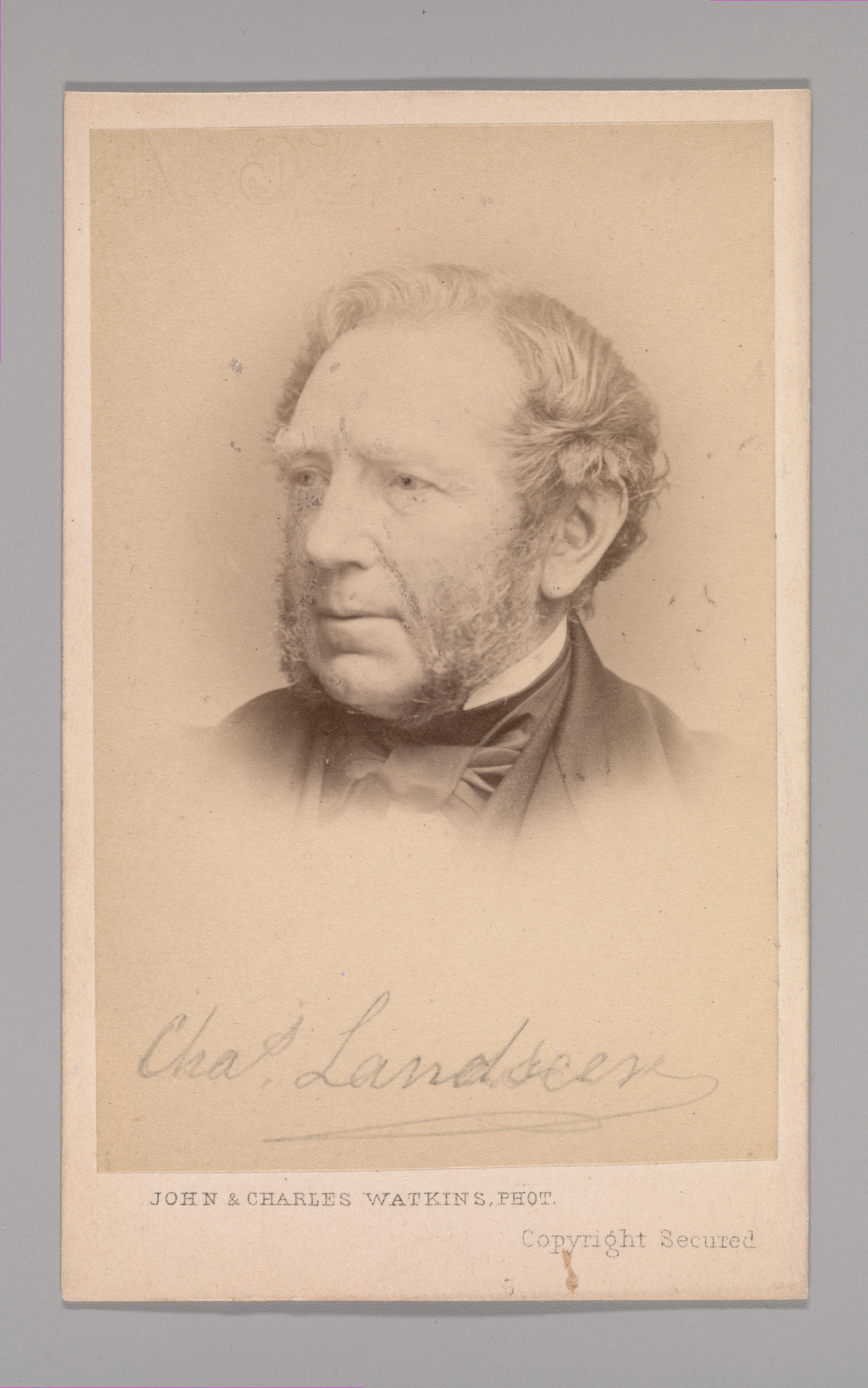 Carte-de-visite; Photographs